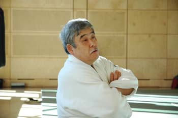 Photo de toshiro suga sur son site lors d'un stage en 2007